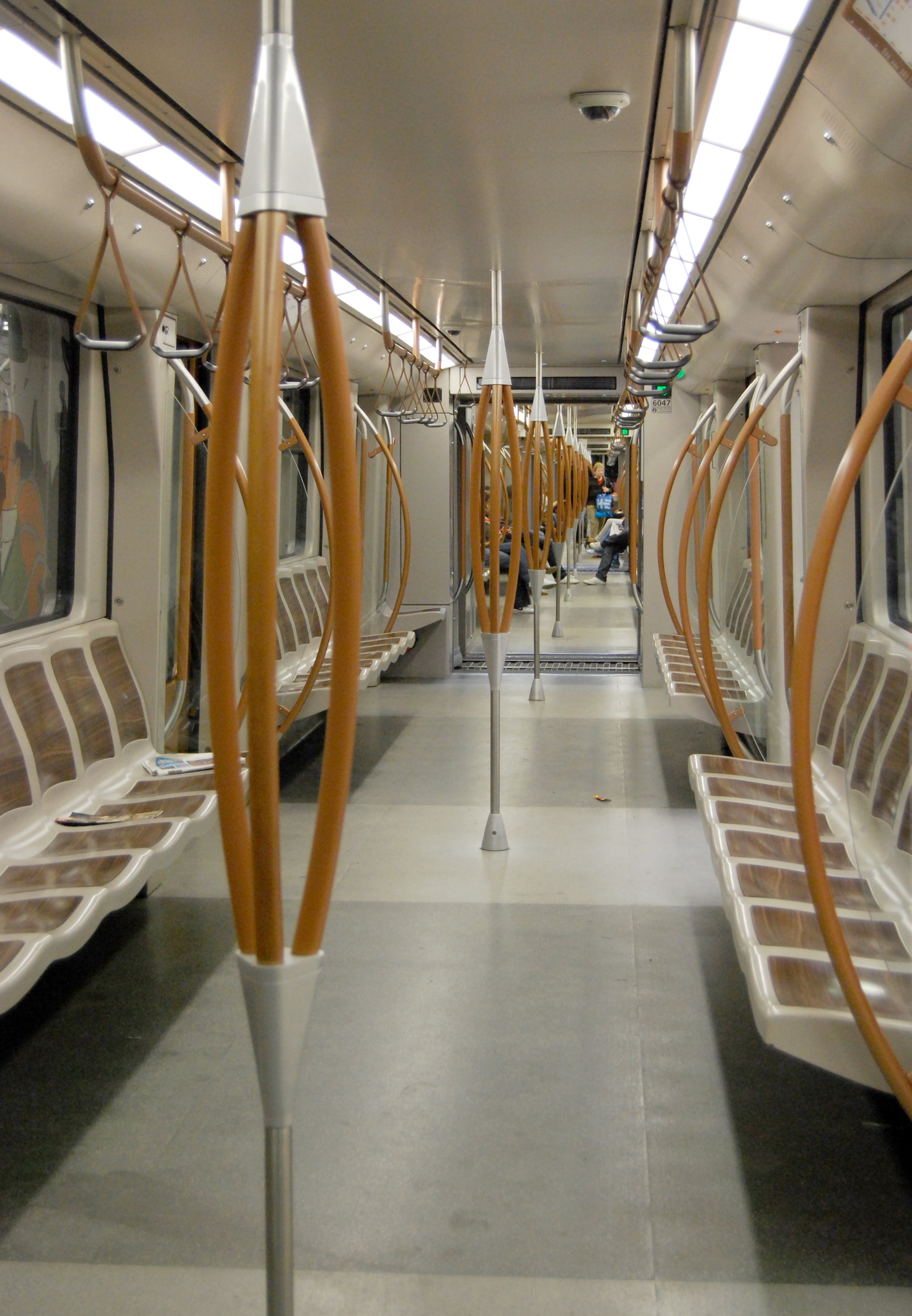 Intérieur rame BOA